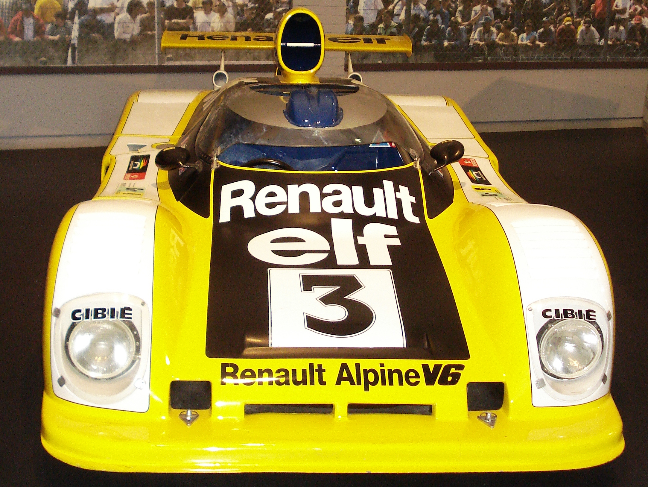 La Renault Alpine A442B victorieuse au Mans en 1978